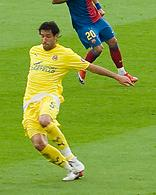 Joan Capdevila w meczu Villareal CF z FC Barcelona This file has been extracted from another file: Messi vs Villarreal 2009.jpg